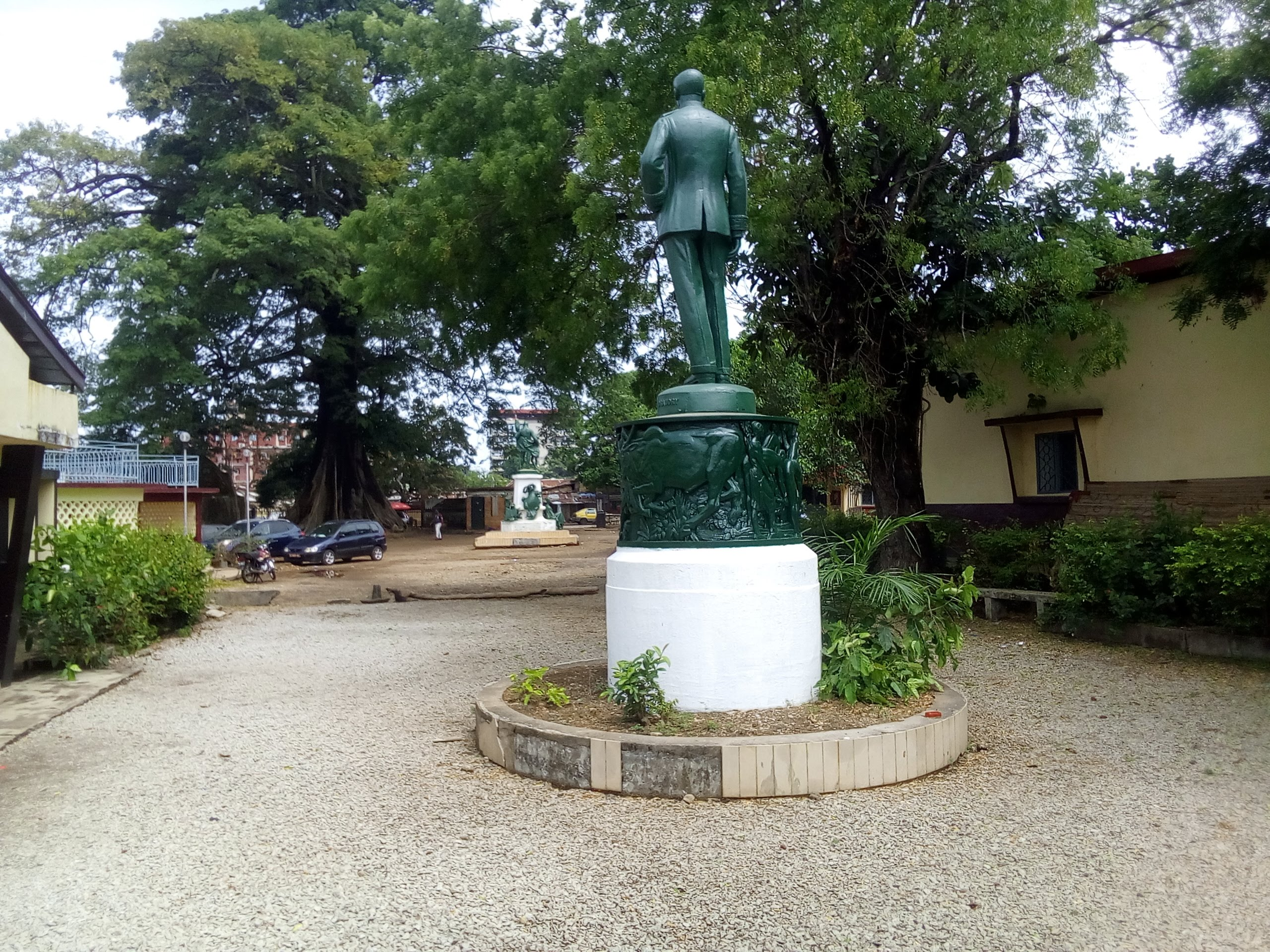 Statut au Musée national de Sandervalia à Conakry